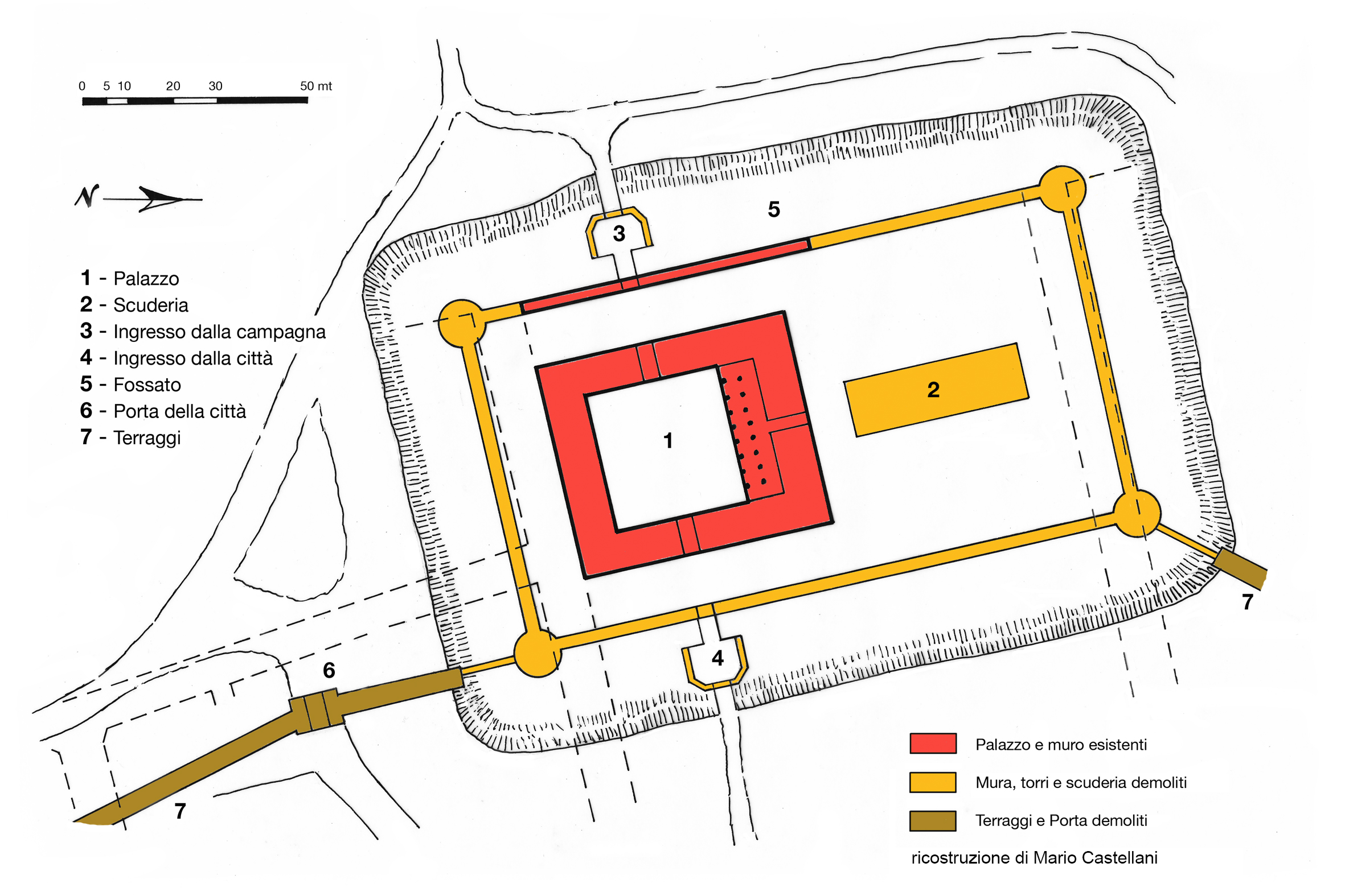 ipotesi ricostruttiva della Rocca Nuova ad inizio '500